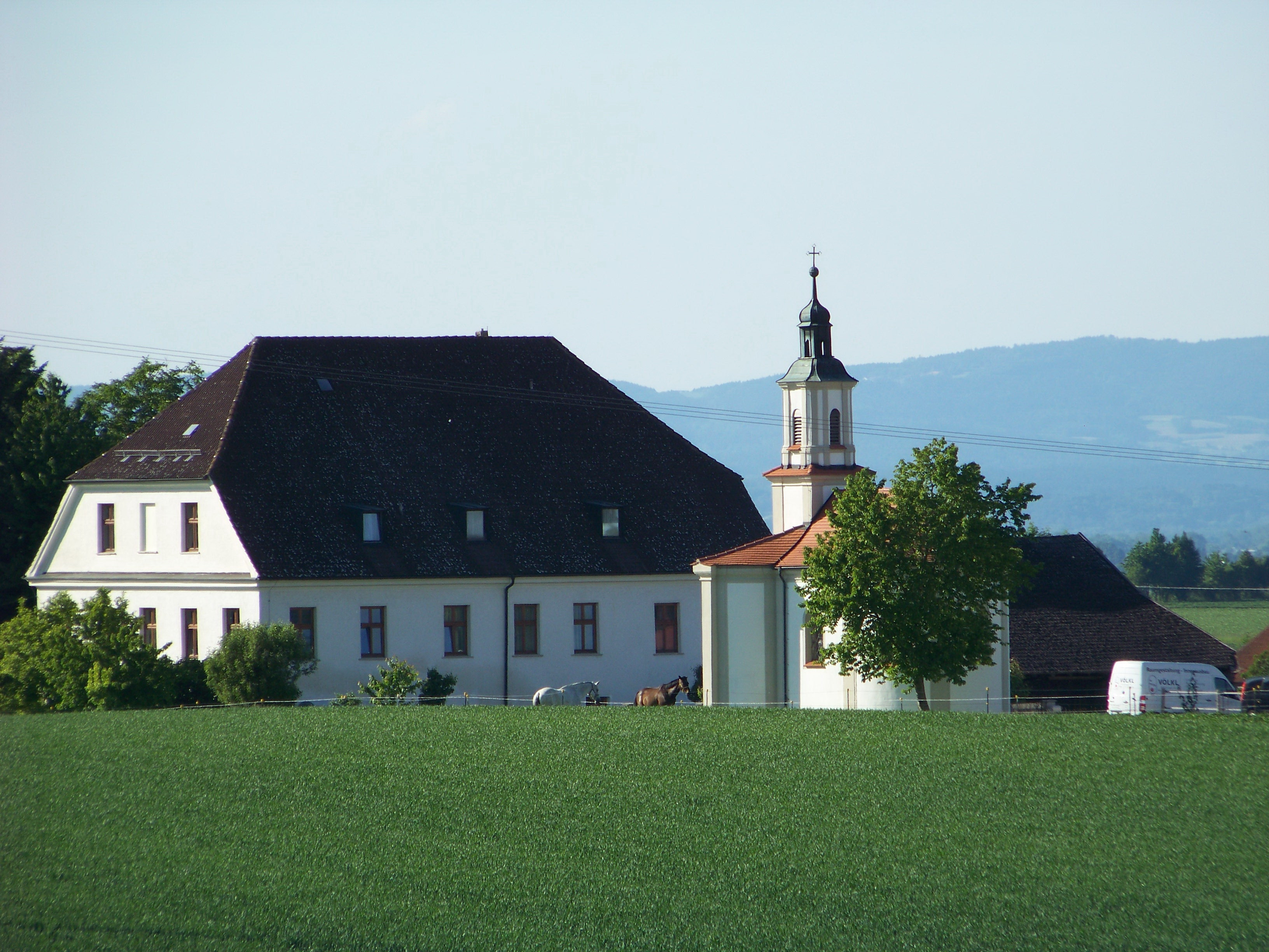 Oberschneiding, Hienhart. Schloss mit Halbwalmdach, erbaut im 17. Jahrhundert, überarbeitet 2. Hälfte 18. Jahrhundert.